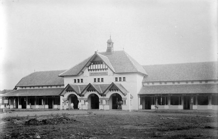 Repronegatief. Hoofdgebouw van de 'Opleidingsschool voor Inlandsche Ambtenaren' te Serang, West-Java